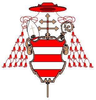 Stemma del Cardinale Federico Caccia, Arcivescovo di Milano.